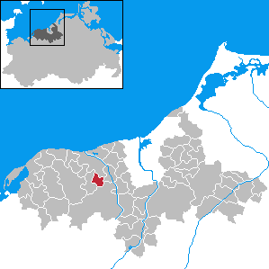 Hohenfelde in Mecklenburg-Western Pomerania - District Bad Doberan